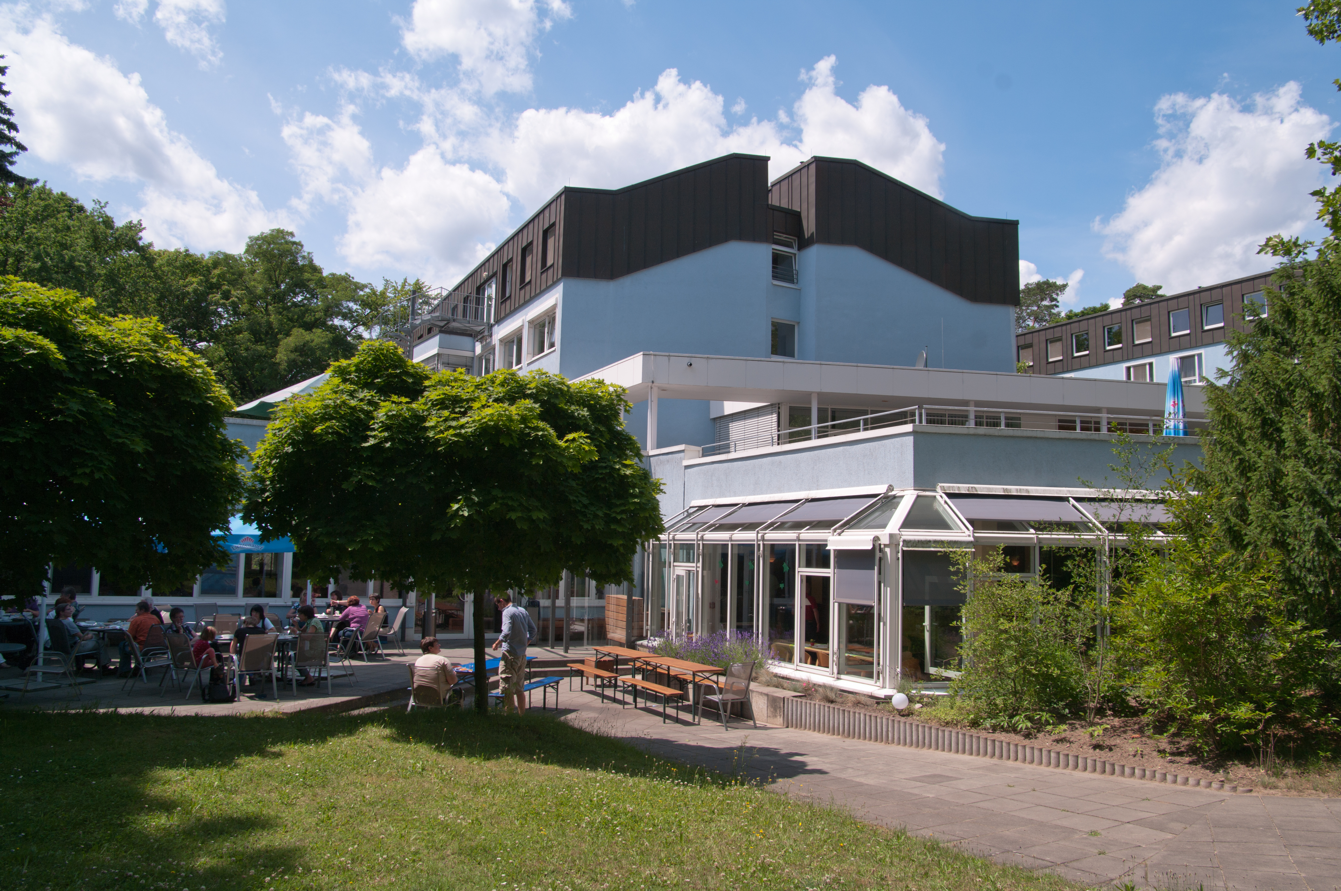 Klausur des Präsidiums von Wikimedia Deutschland im Juni 2012 - Bildungs- und Begegnungszentrum Clara Sahlberg am großen Wannsee.